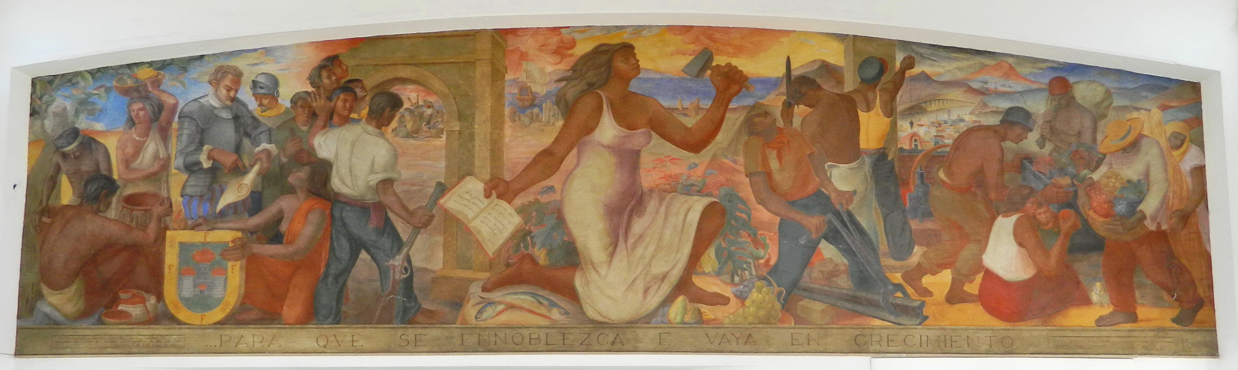 Mural “Historia de La Serena” This is a photo of a national monument in Chile: 349